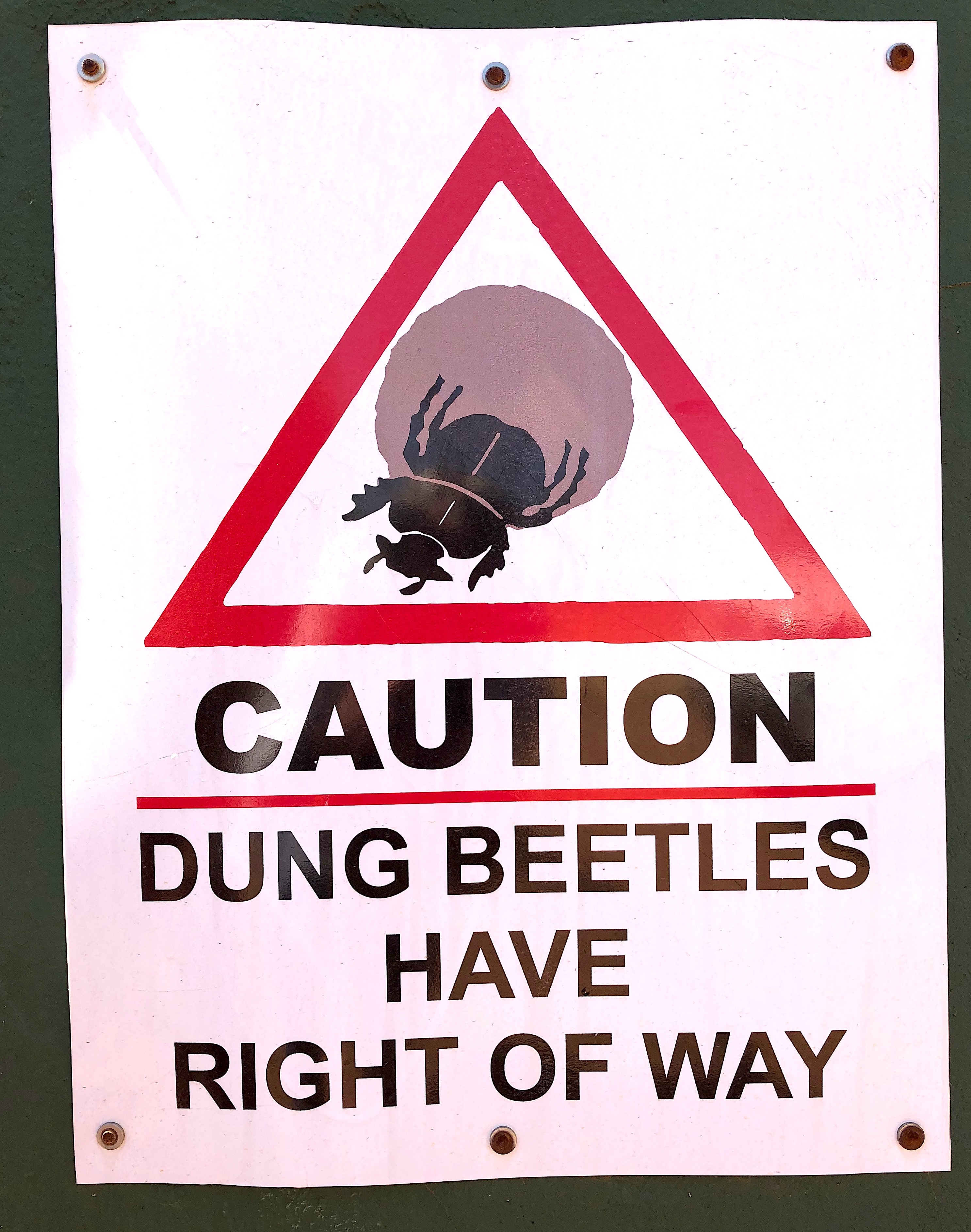 Vorsicht Dungkäfer, Südafrika